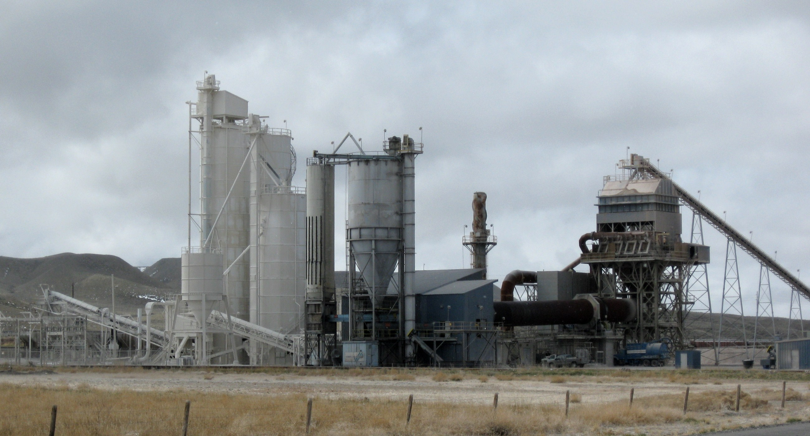 Cement plant, Wyoming / 2008